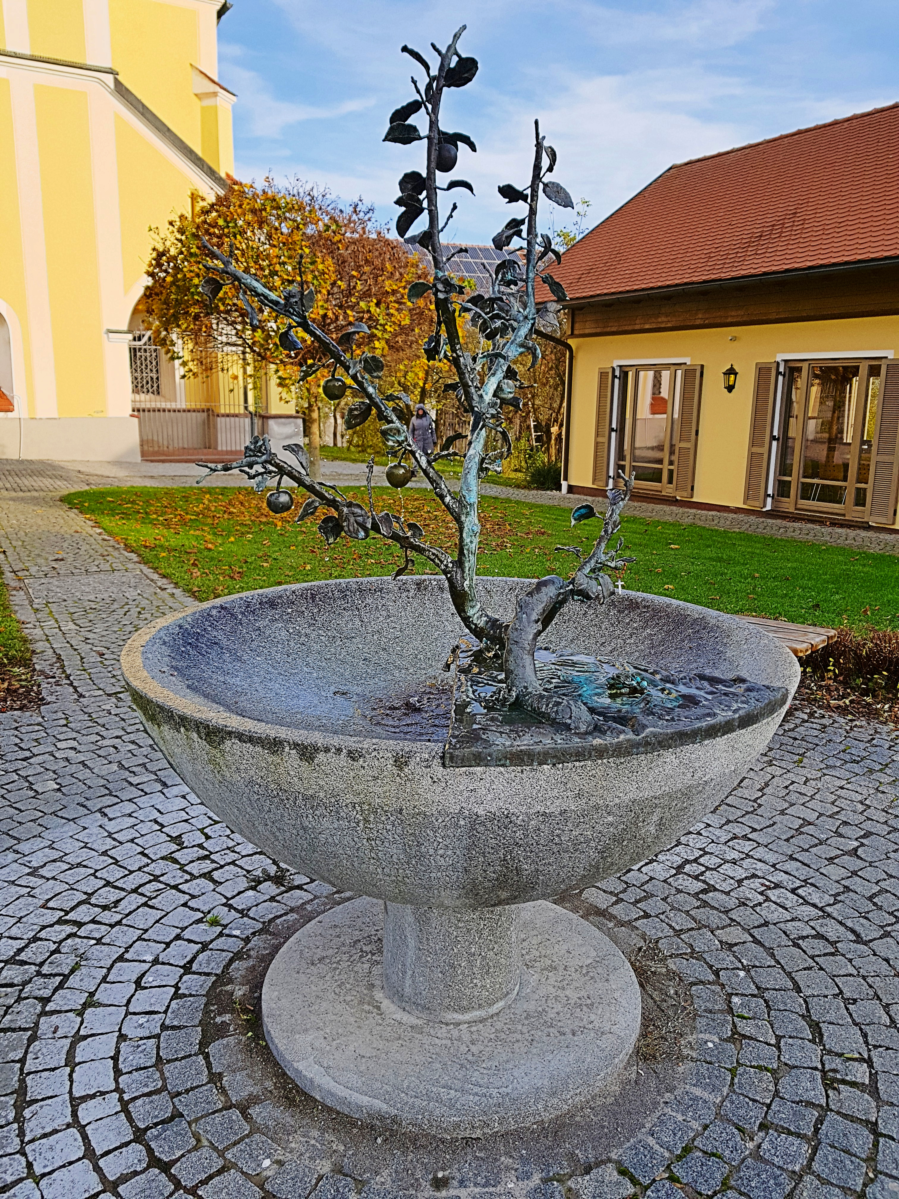 "Brunnen der Dankbarkeit" von der Bildhauerin E. M. Göpfert. Vor der Wallfahrtskirche von Sammarei im niederbayerischen Landkreis Passau.File